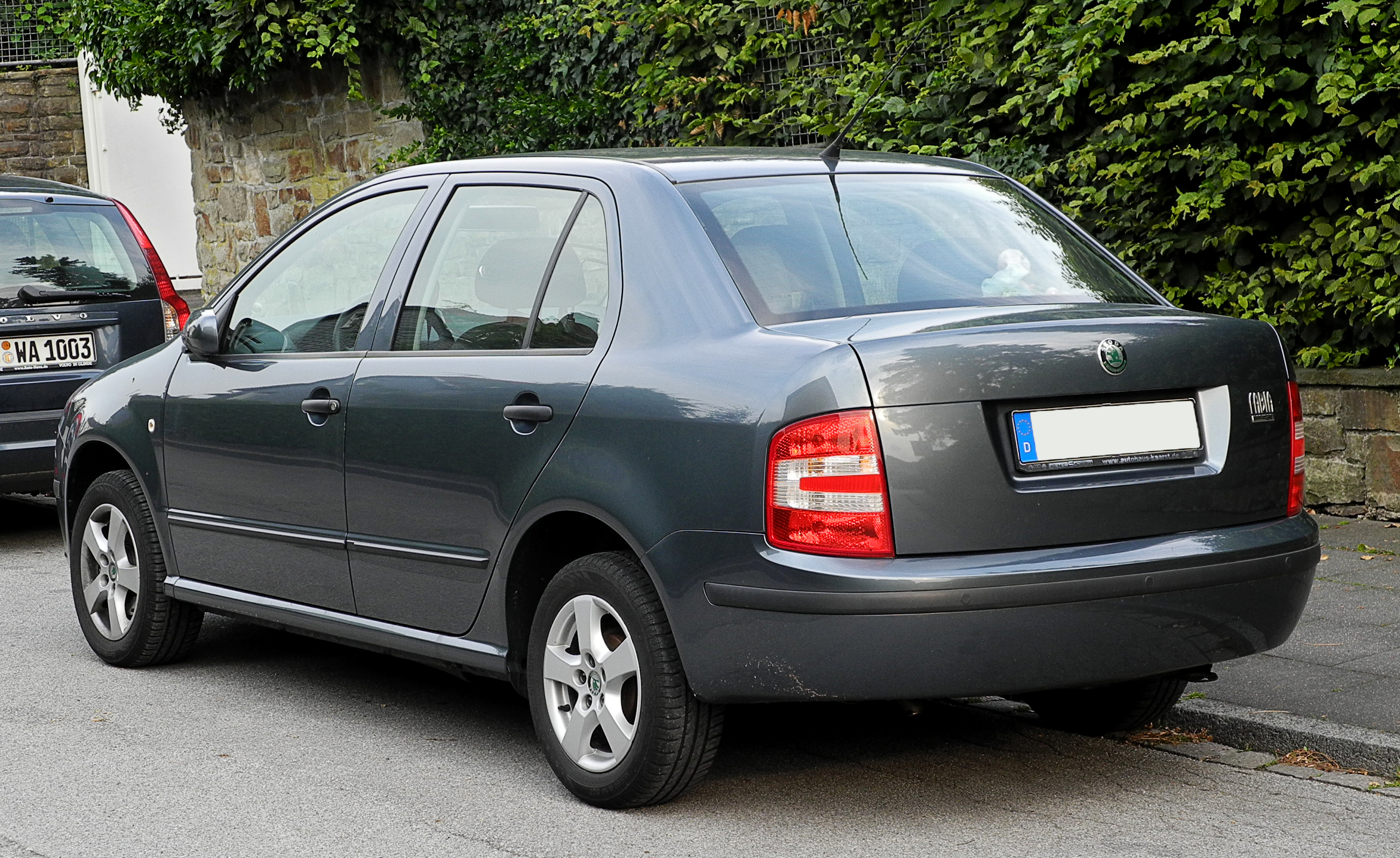 Skoda Fabia Sedan 1.4 16V (I, Facelift)